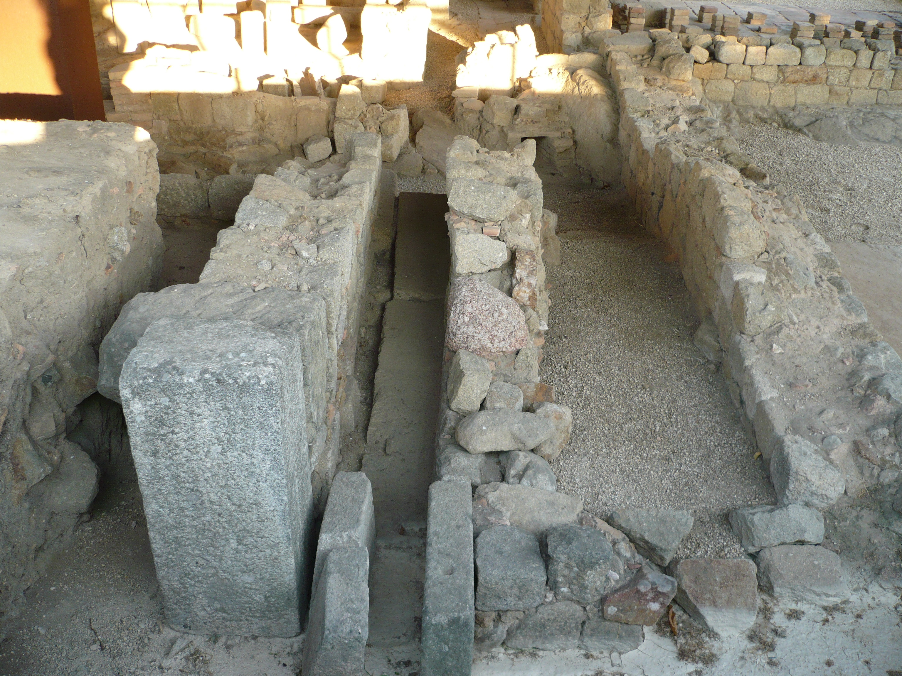 Pormenor das Termas de Maximinos, Braga